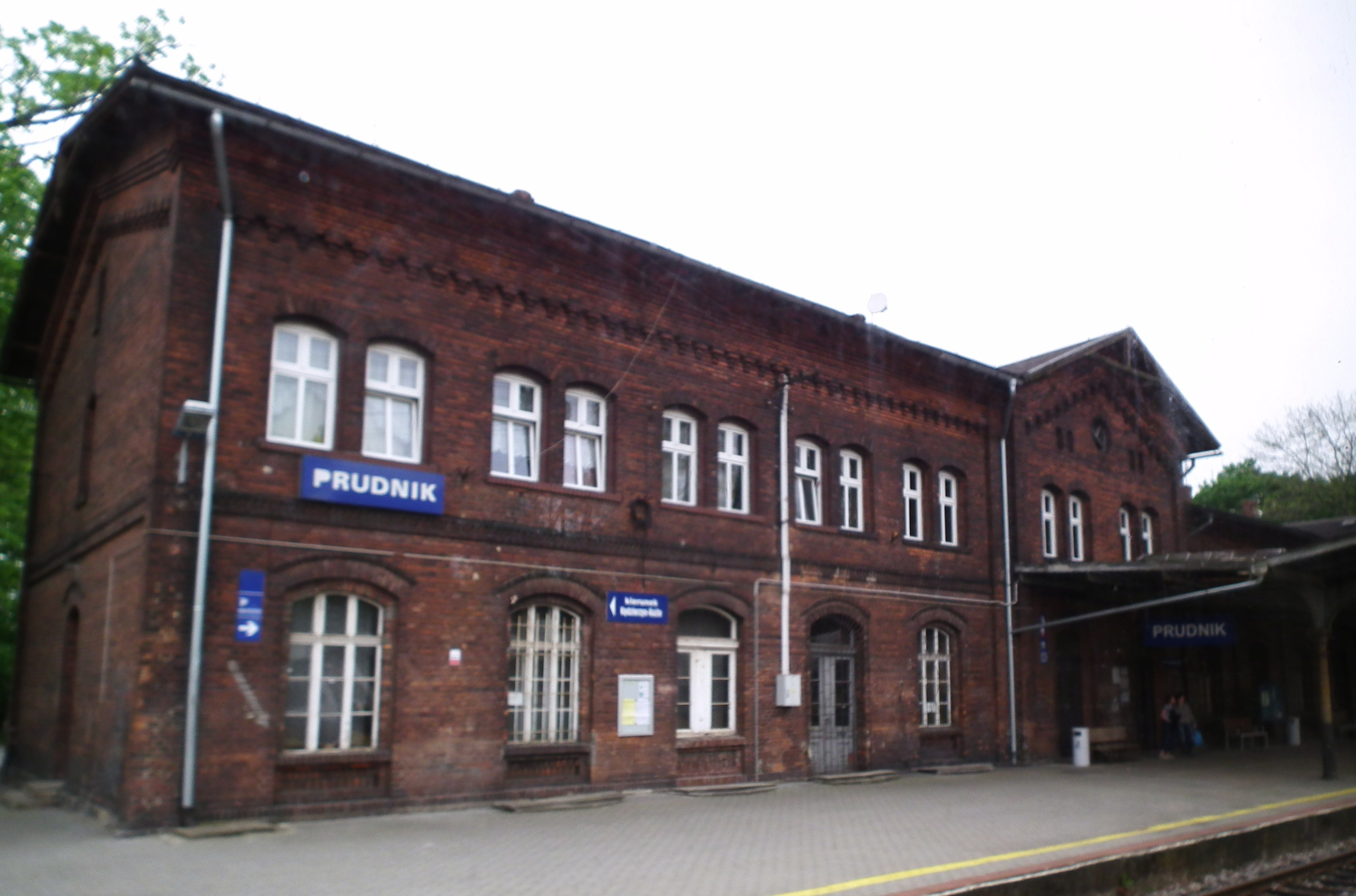 Stacja kolejowa w Prudniku.